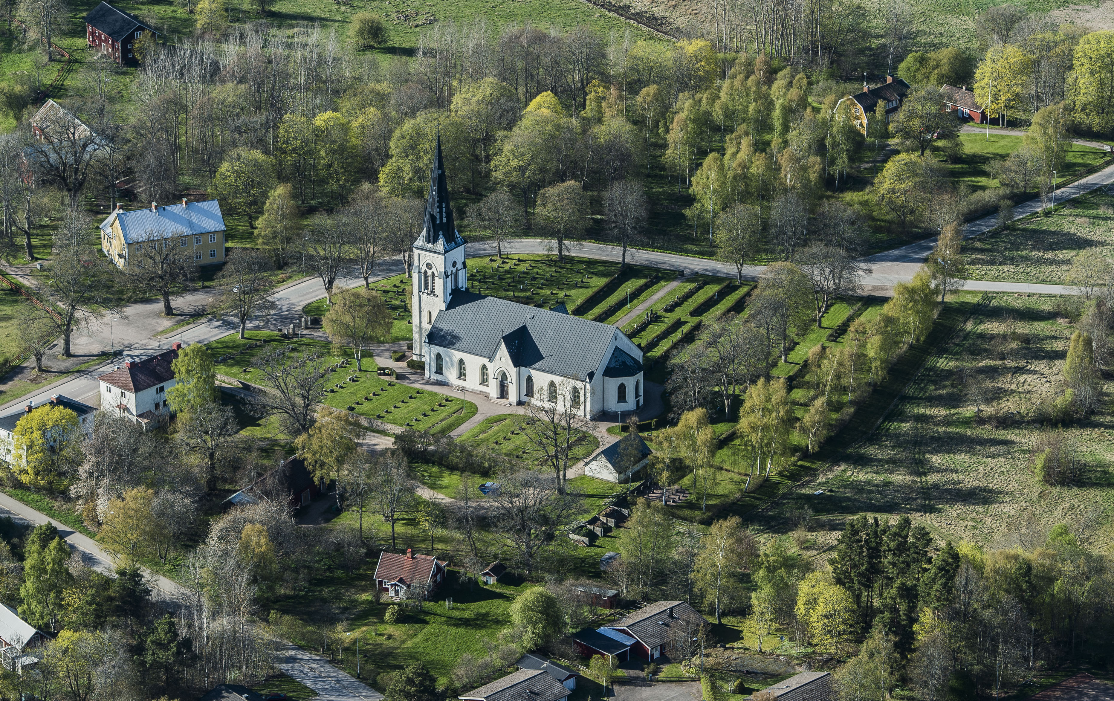 Fagerhults ka